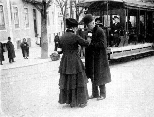 Tramoj en Portugalio